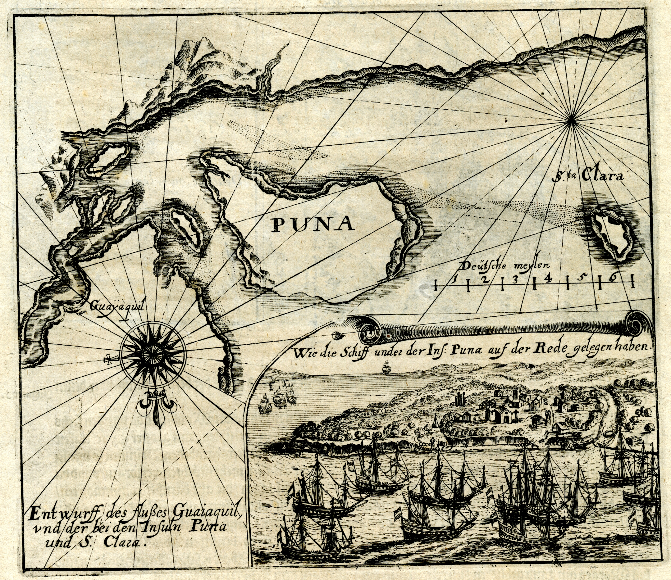 Vista de una Escuadra holandesa comandada por Jacobo Heremita Clerk frente a la Isla de la Puná en el Corregimiento de Guayaquil. Szaszdi, Adam. Don Diego Tomalá Cacique de la Isla de la Puná / Un caso de aculturación socioeconómica. (II Edición con la debida autorización). Museo Antropologico del Banco Central del Ecuador. Santiago de Guayaquil Año 1988. Dibujo e ilsutraciój original del Catrógrafo alemán M. Merian (1630), Nurenberg. Diapositiva de acceso público consultada del ejemplar original que se custodia en los Fondos Bibliográficos (Sección: Historia de Guayaquil) del Archivo Histórico del Guayas - Guayaquil, Ecuador.Consultado y compartido por el usuario J. Javier García A.